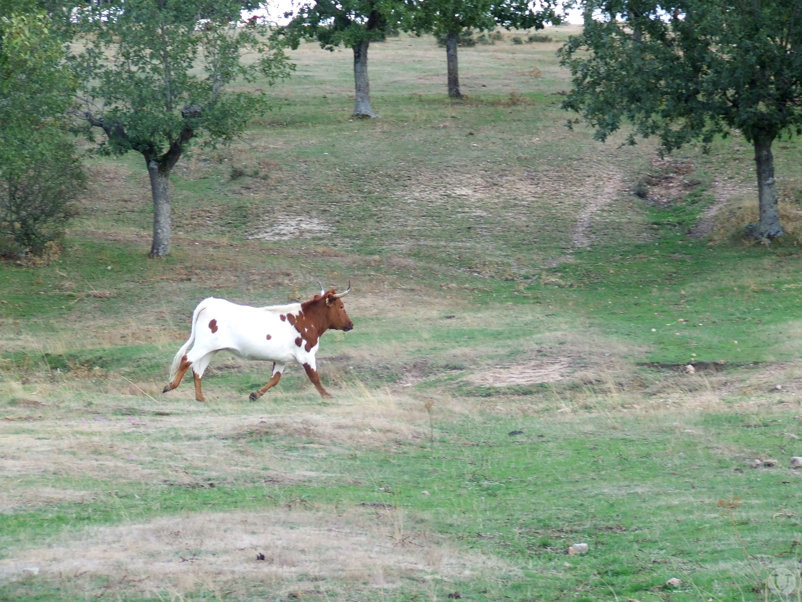 Ejemplar de vaca berrenda en colorado en el campo. Fotografía tomada en la Dehesa de Valdelazarza (Salamanca)